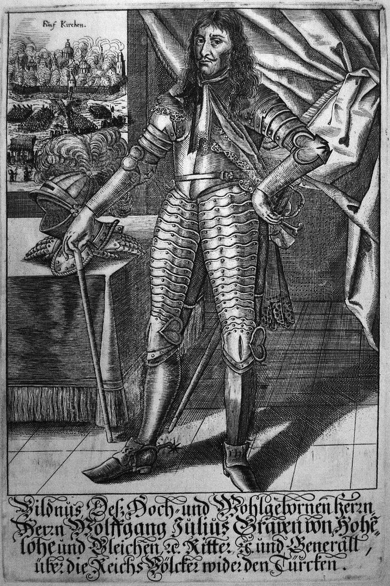 Graf Wolfgang Julius von Hohenlohe-Neuenstein-Neuenstein (1622–1698). Breite 19,0 × Höhe 30,6 cm.